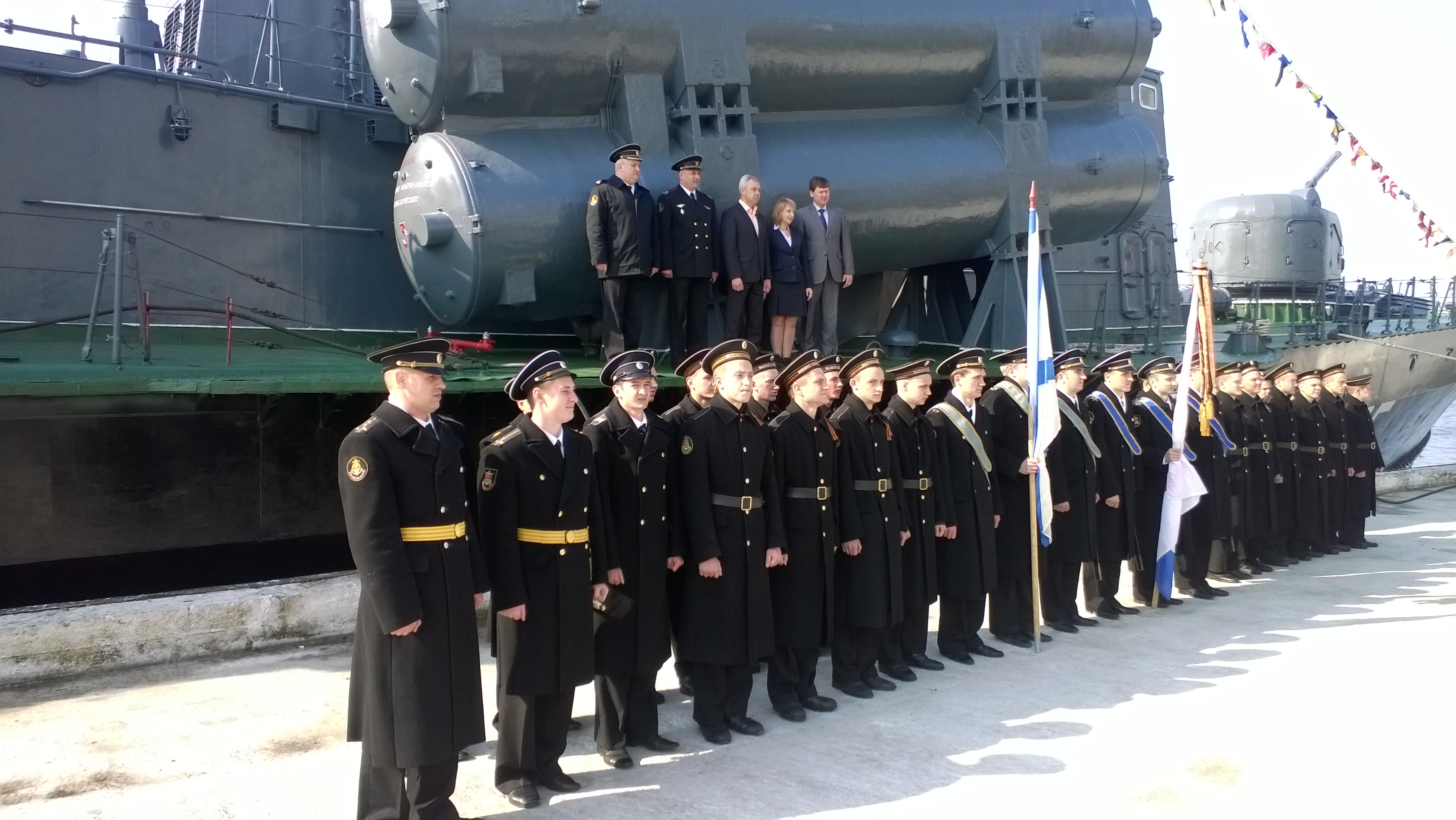 рка "Заречный". 19.04.2014 года